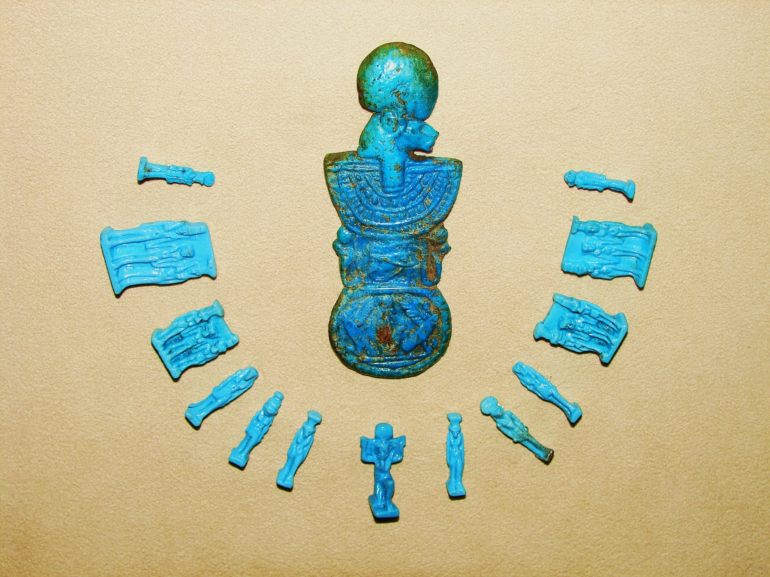 ഈജിപ്ഷ്യൻ ആഭരണങ്ങൾ - വാൾട്ടേഴ്സ് ആർട്ട് മ്യൂസിയിയത്തിലെ ശേഖരത്തിൽ നിന്നും